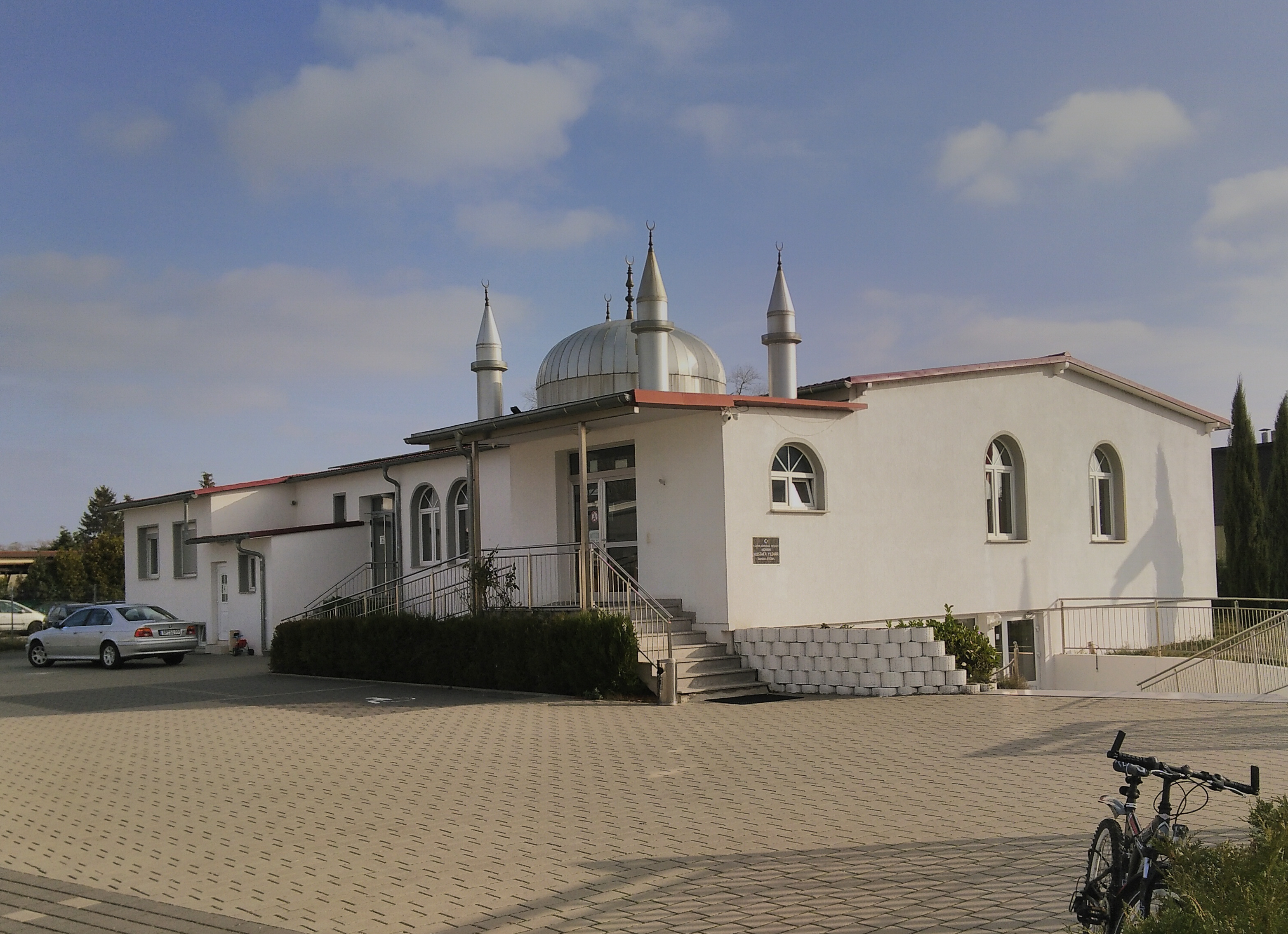 Die Fotografie zeigt die Fatih-Moschee in Speyer-Nord.